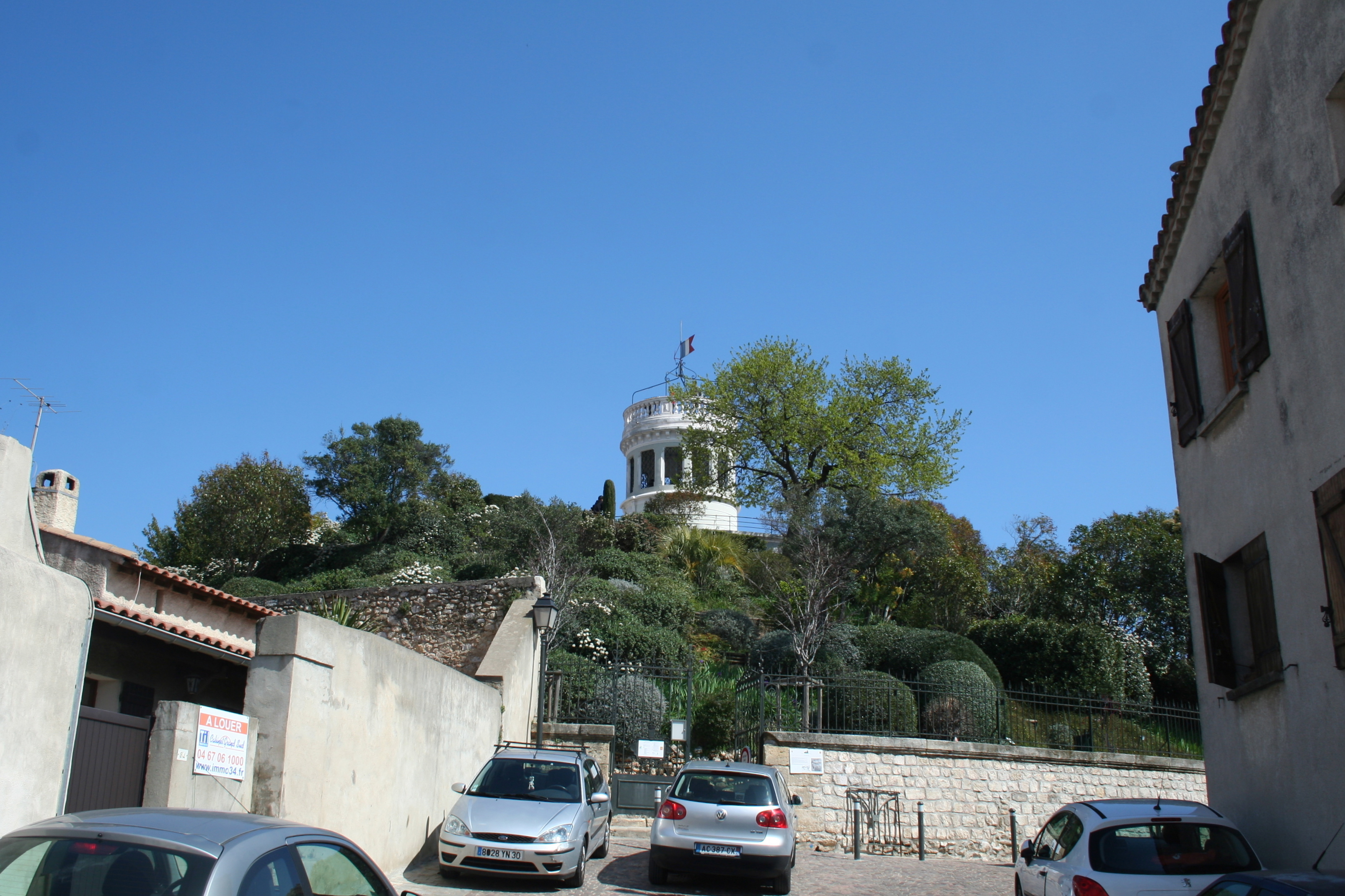 Mauguio (Hérault) - ancienne motte féodale et réservoir d'eau.